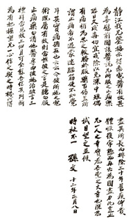 《1923年1月8日，致张静江》 孙中山手书。